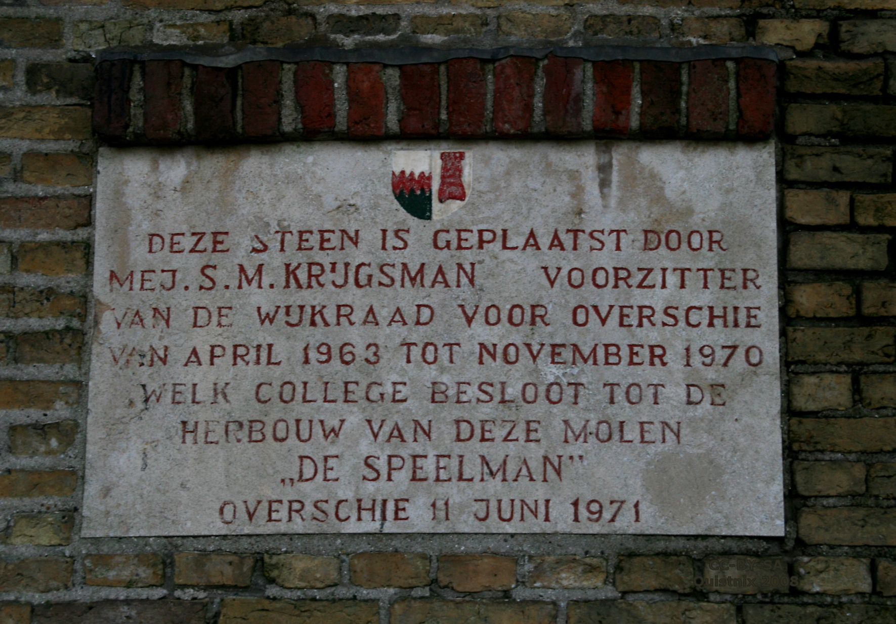 Rotterdam-Overschie, windmolen De Speelman: gedenksteen n.a.v. de herbouw